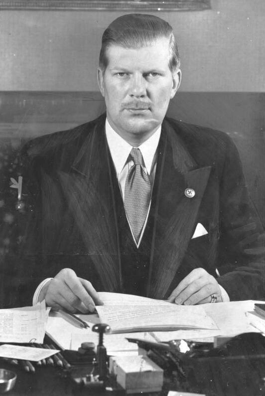 Alexander Freiherr v. Dörnberg Freiherr von Dörnberg, der deutsche Chef des Protokolls in Brüssel 167-38 [Alexander Freiherr v. Dörnberg mit NSDAP-Parteiabzeichen, am Schreibtisch sitzend] Abgebildete Personen: Doernberg, Alexander von Freiherr: Diplomat, Protokollchef, Deutschland